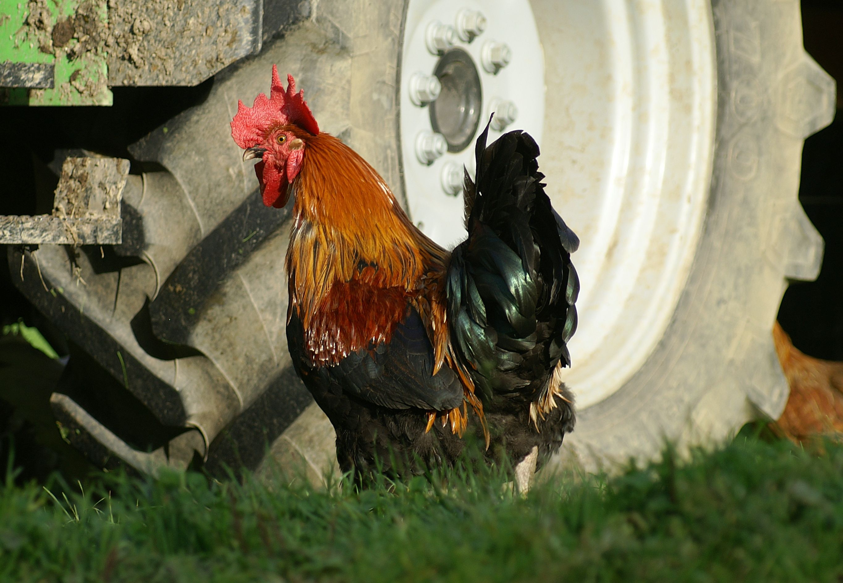 Ein Hahn in Schönenbach im Bregenzerwald